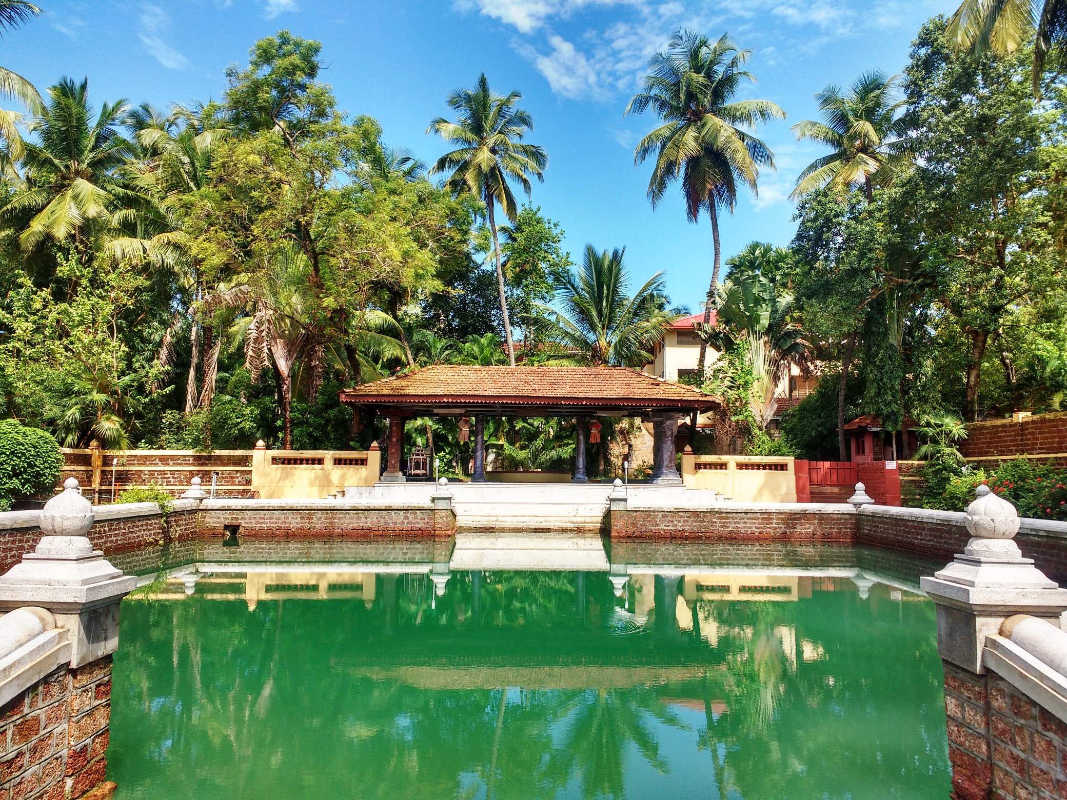 ಕನ್ನಡ: ಶಿವಗಂಗಾ ಸರೋವರ